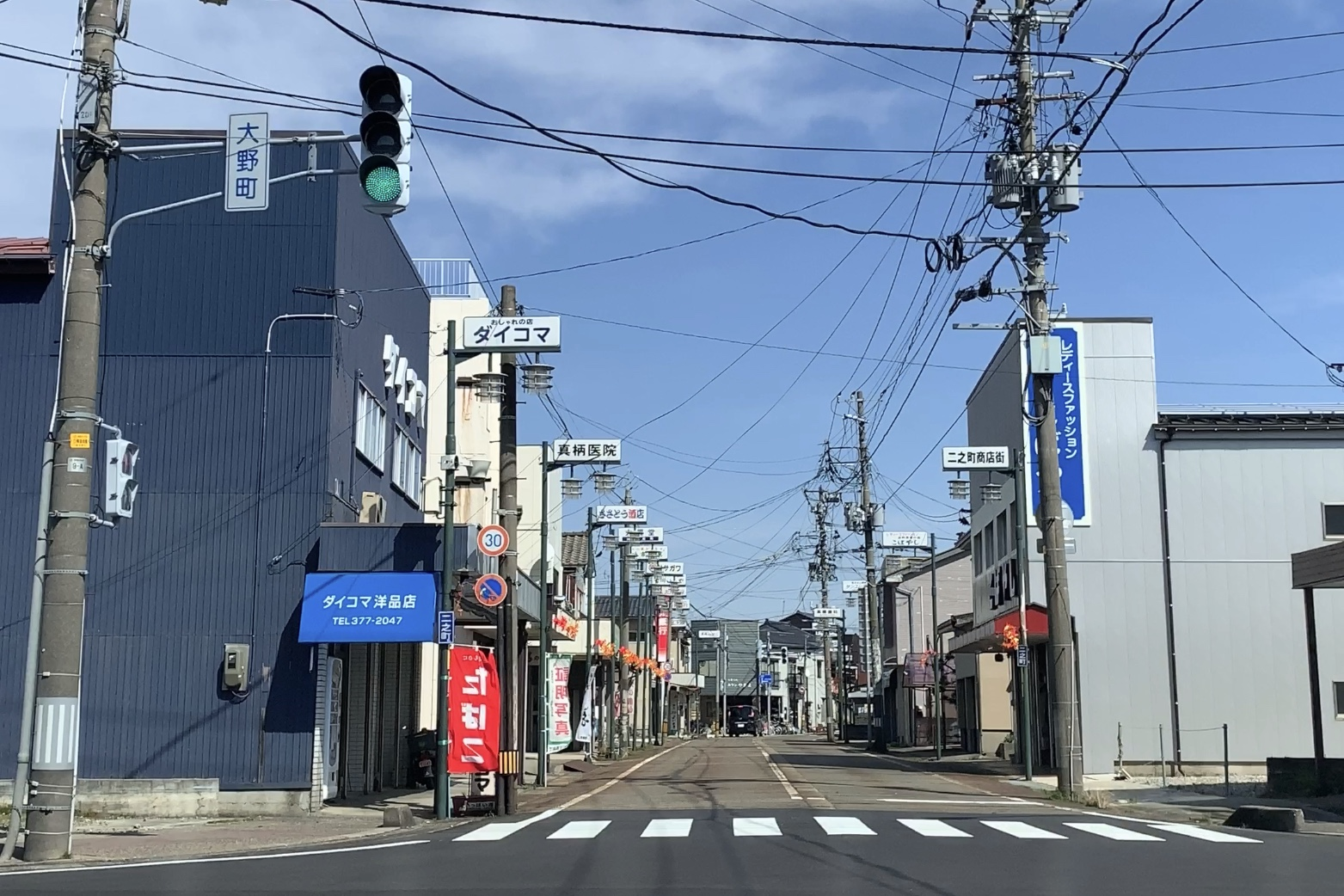 新潟市西区（旧黒埼町）大野の商店街（2020年3月）